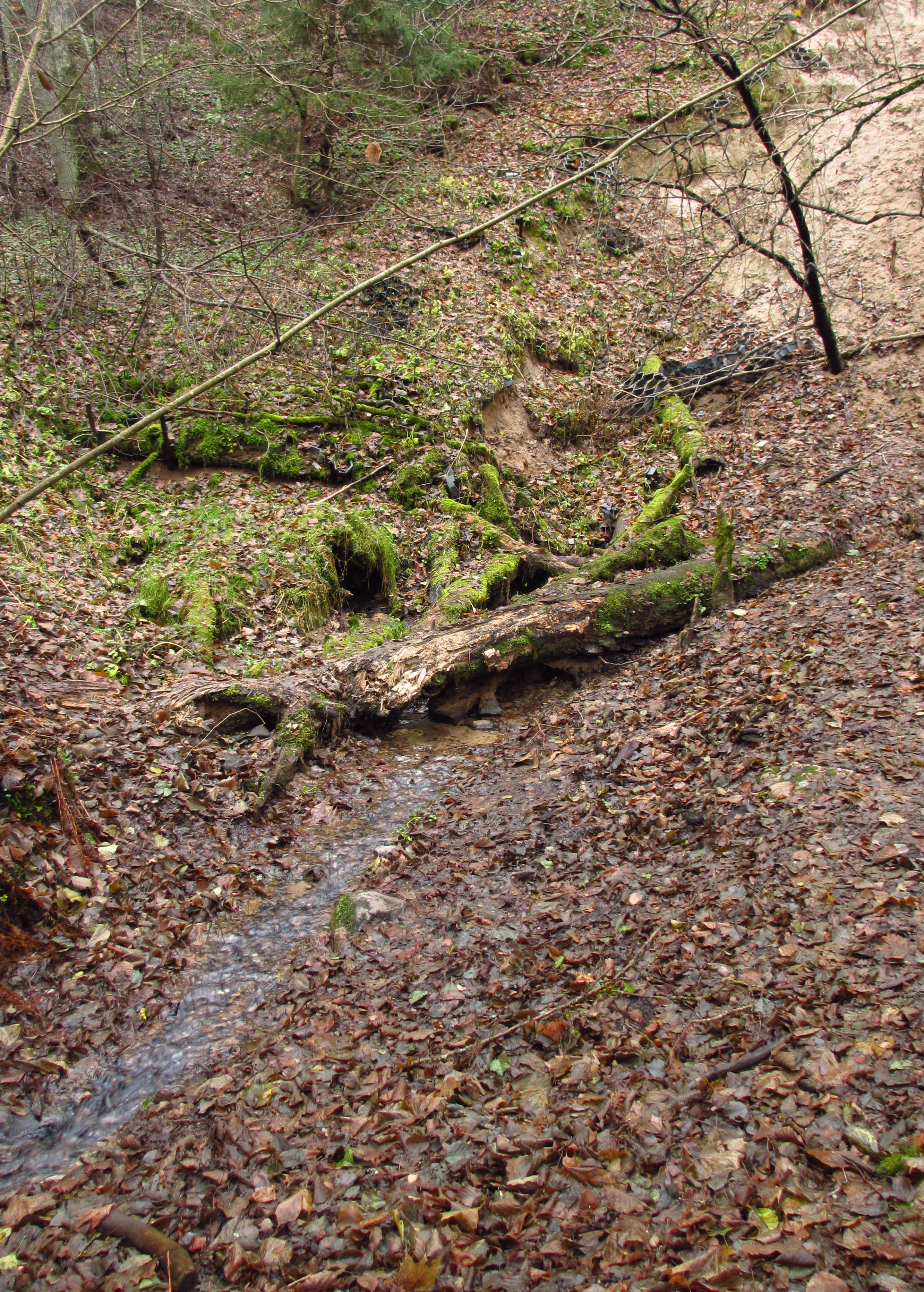 Glehni pargi allikad sh. Rõõmuallikas